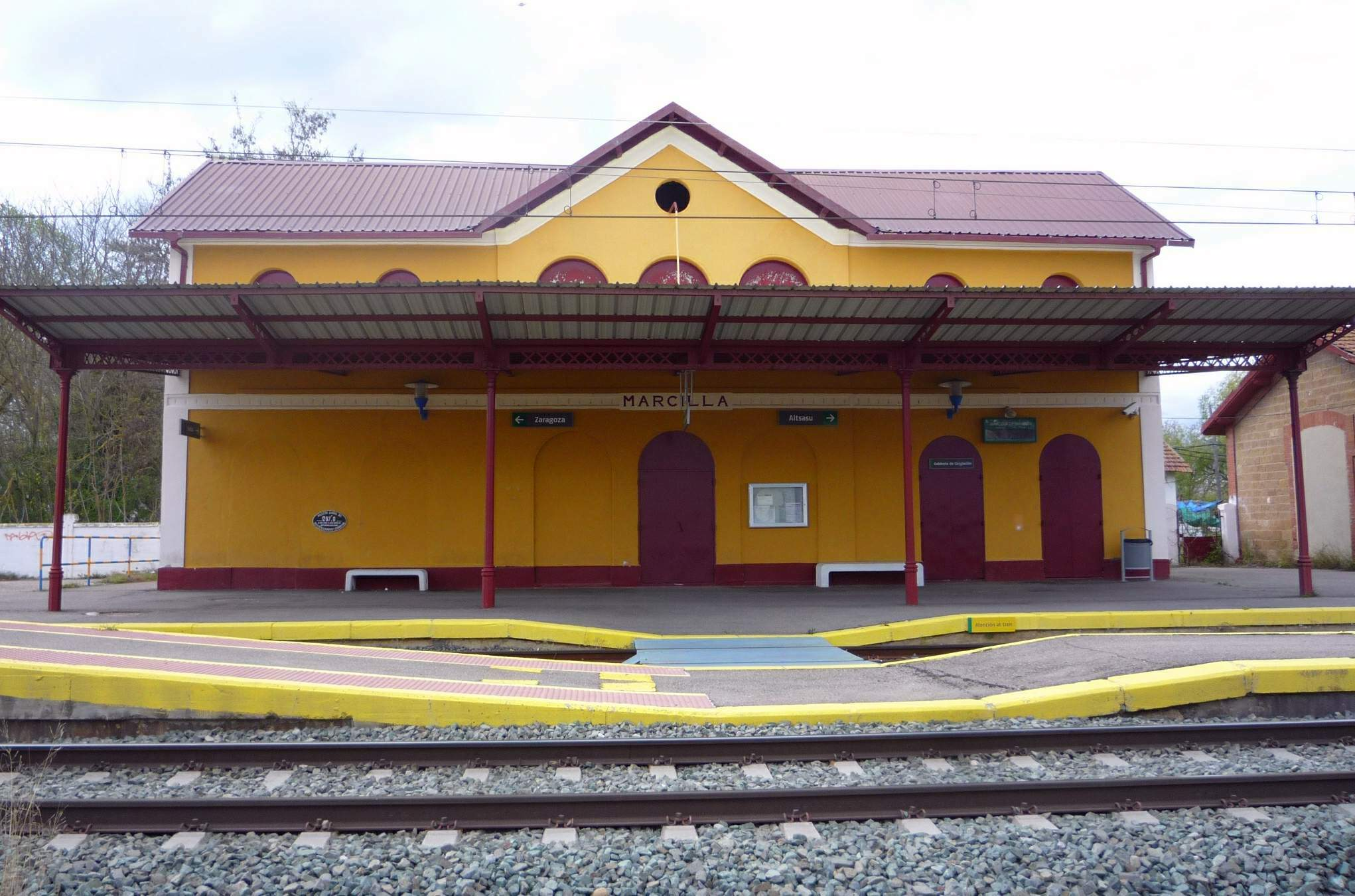 Estación de Marcilla de Navarra